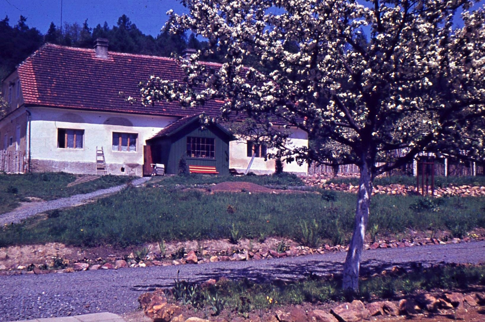 Stará hájovna na Pískách (místní část Křivoklátu)